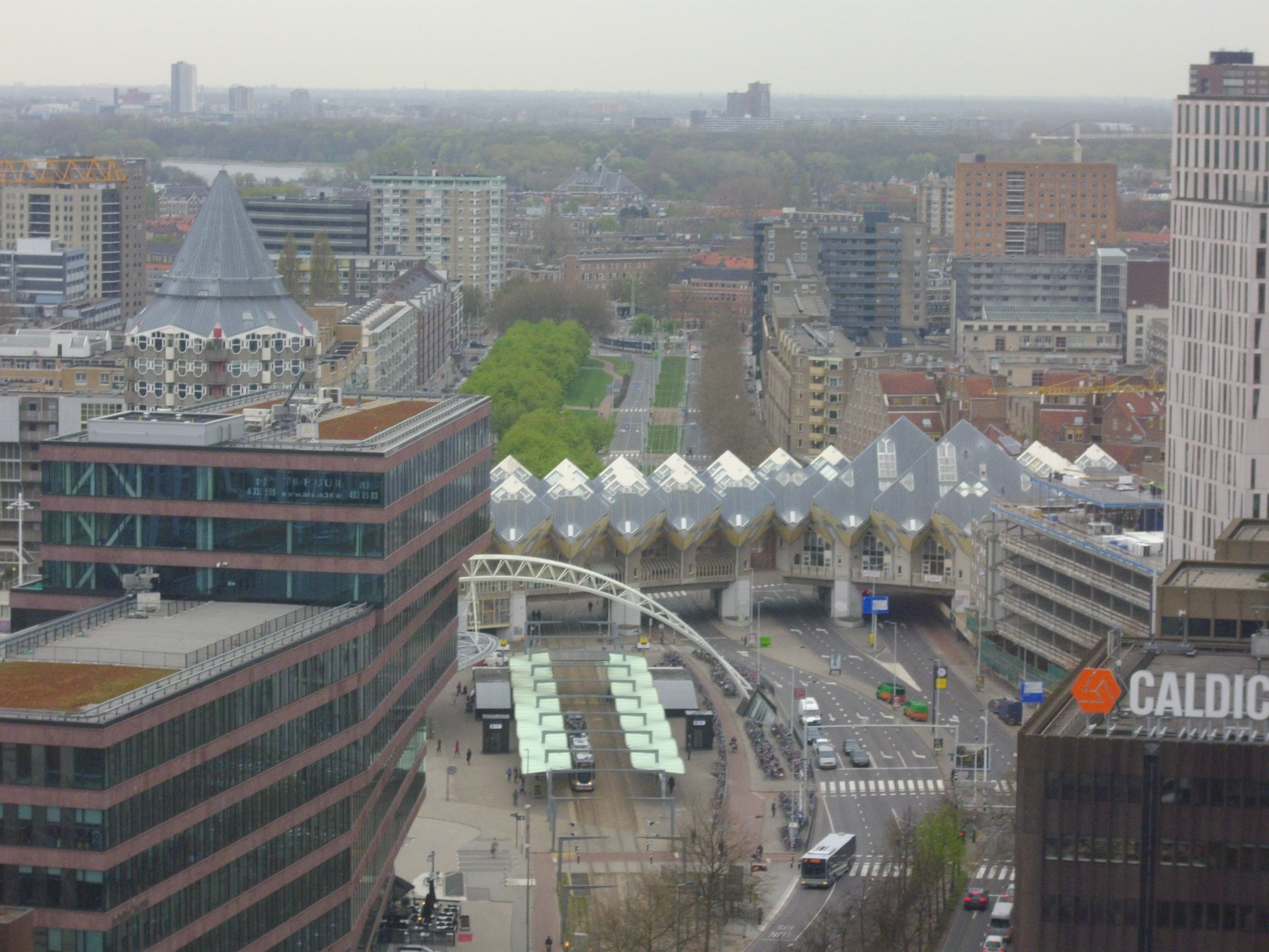 Cube-like houses at Rotterdam